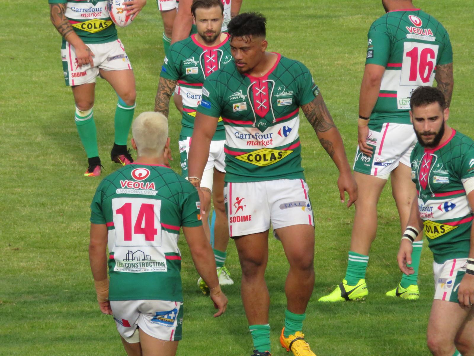 Equipe de Lézignan lors de la finale du Championnat de France de rugby à XIII 2017 à Narbonne entre Limoux et Lézignan.